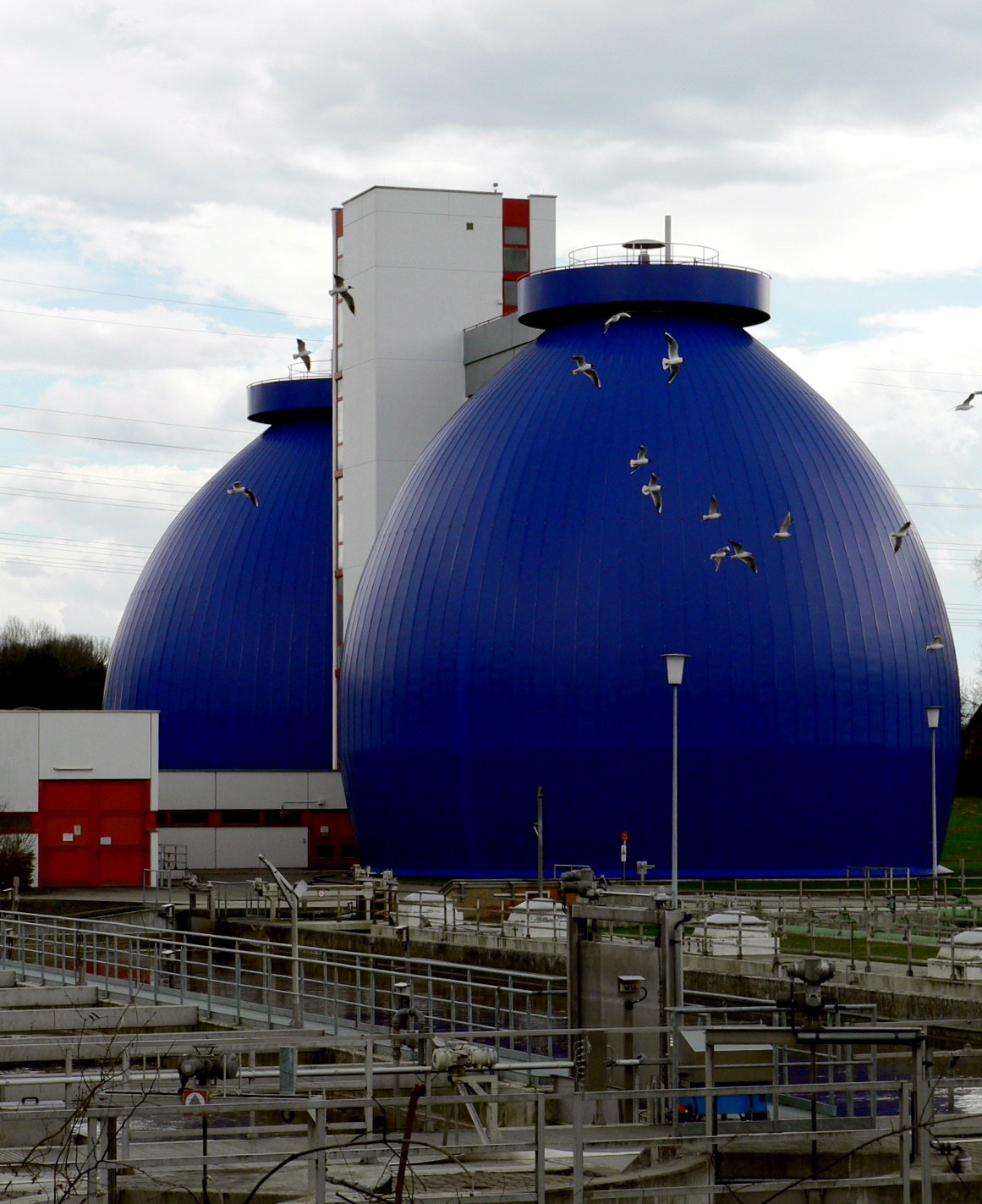 Kläranlage Langewiese, Ortschaft Eschach, Stadt Ravensburg: Faulturm mit Möwen